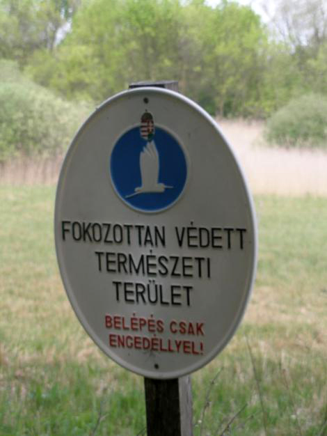 Fokozottan védett tábla a kistómalmi lápréten. Fertő-Hanság Nemzeti Park.